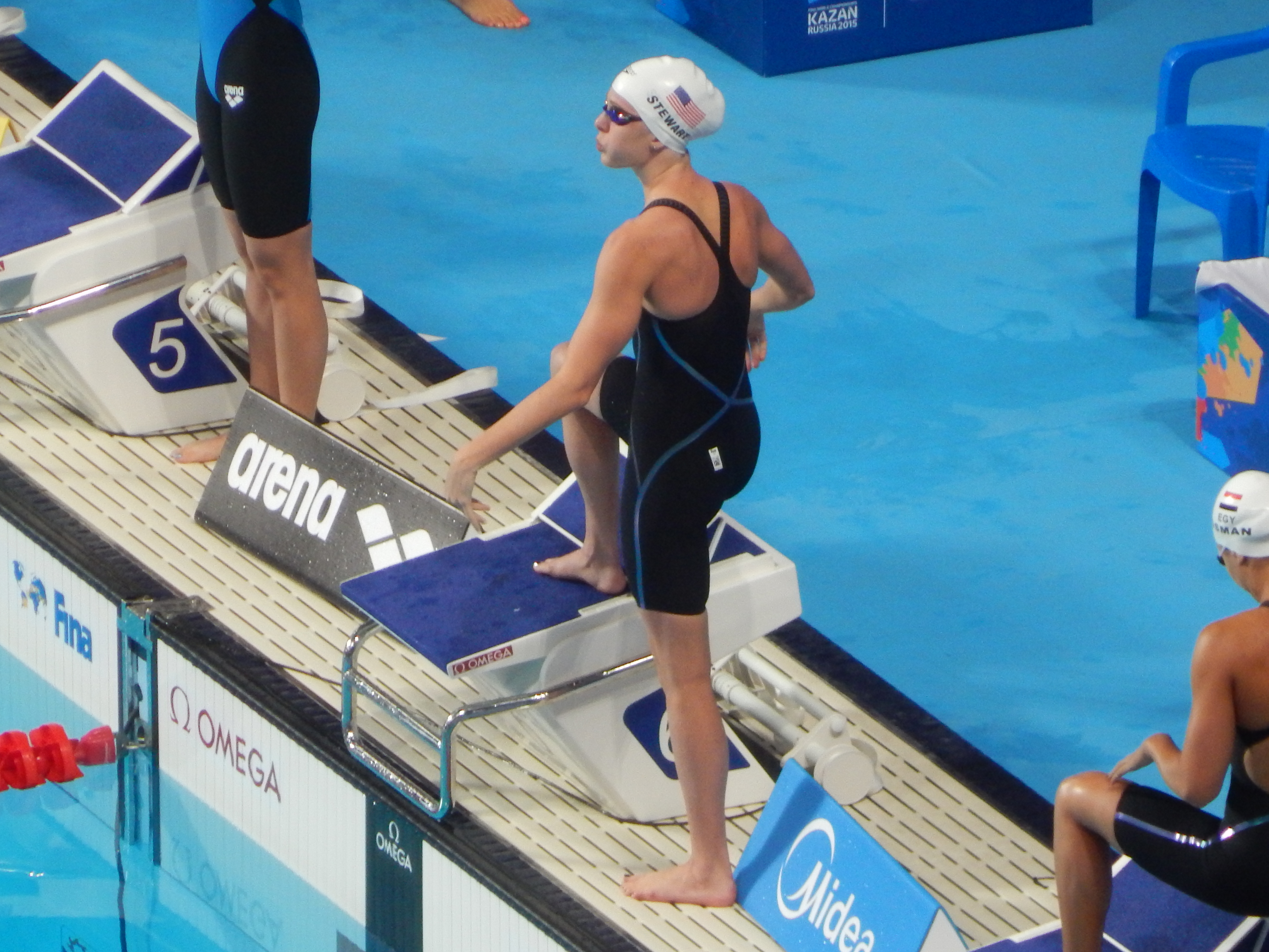 Заплыв на чемпионате мира в Казани баттерфляем 50 метров полуфинал